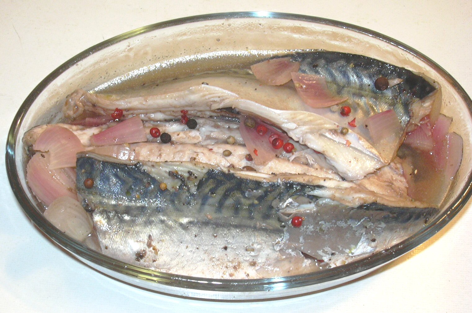 maquereaux au vinaigre